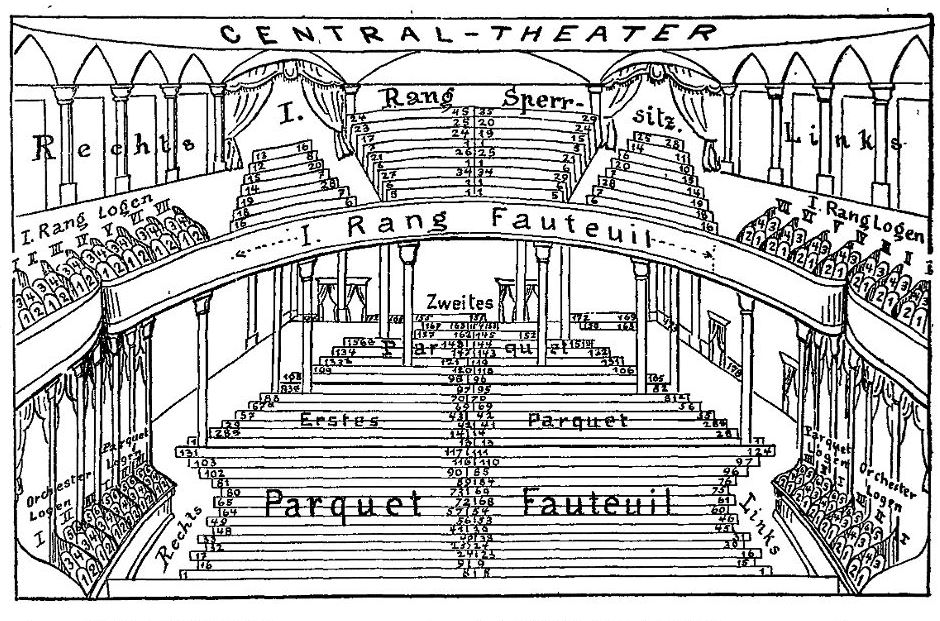 Central-Theater, Alte Jakobstr. 30-32, Berlin, Bestuhlung